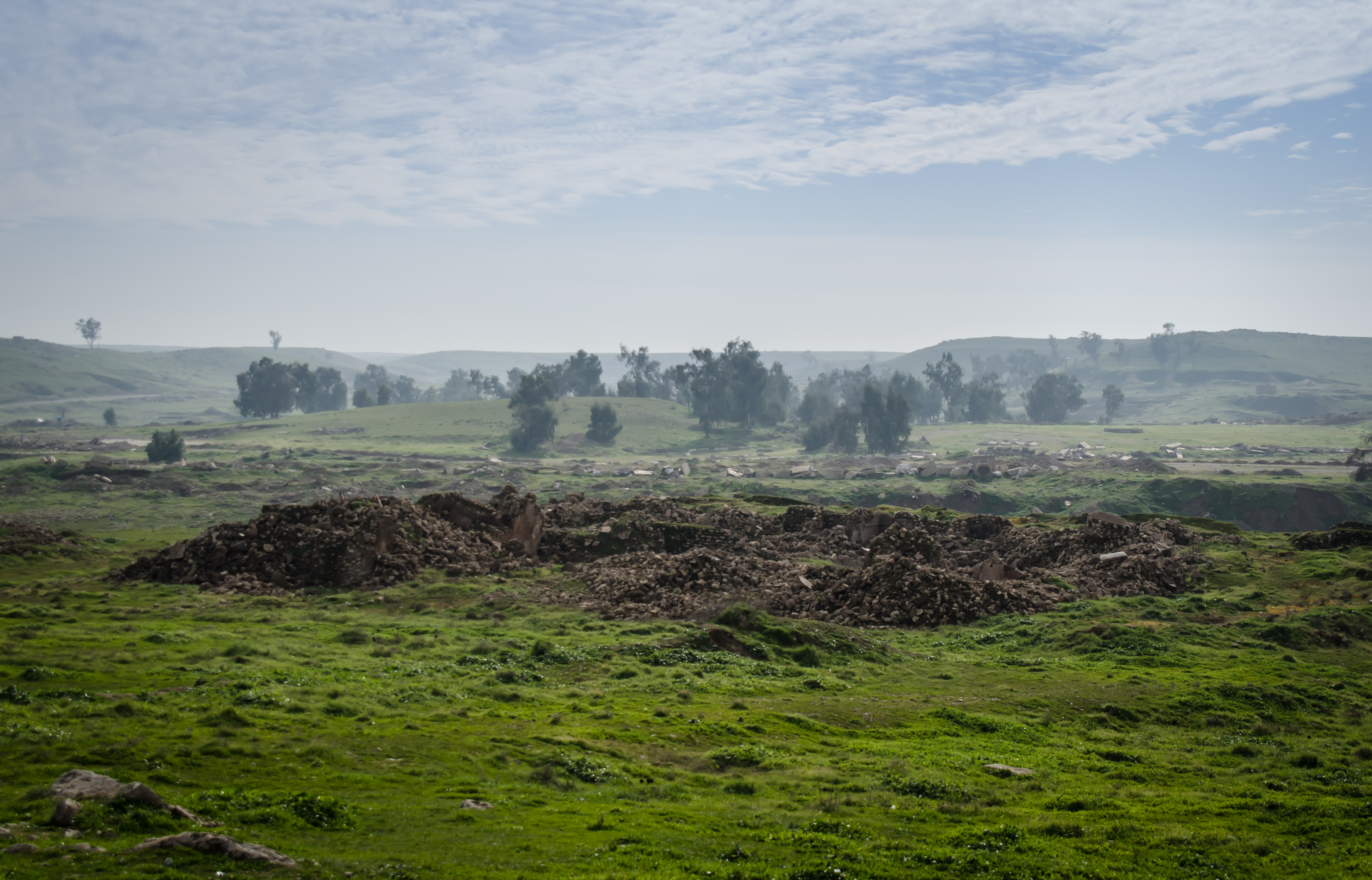 Die Reste des zerstörten Klosters (Januar 2019)